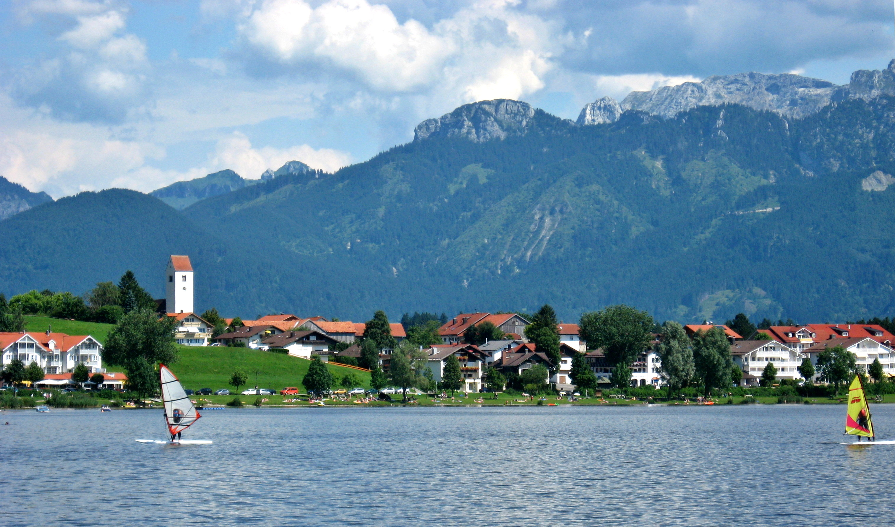 Blick auf Hopfen an See